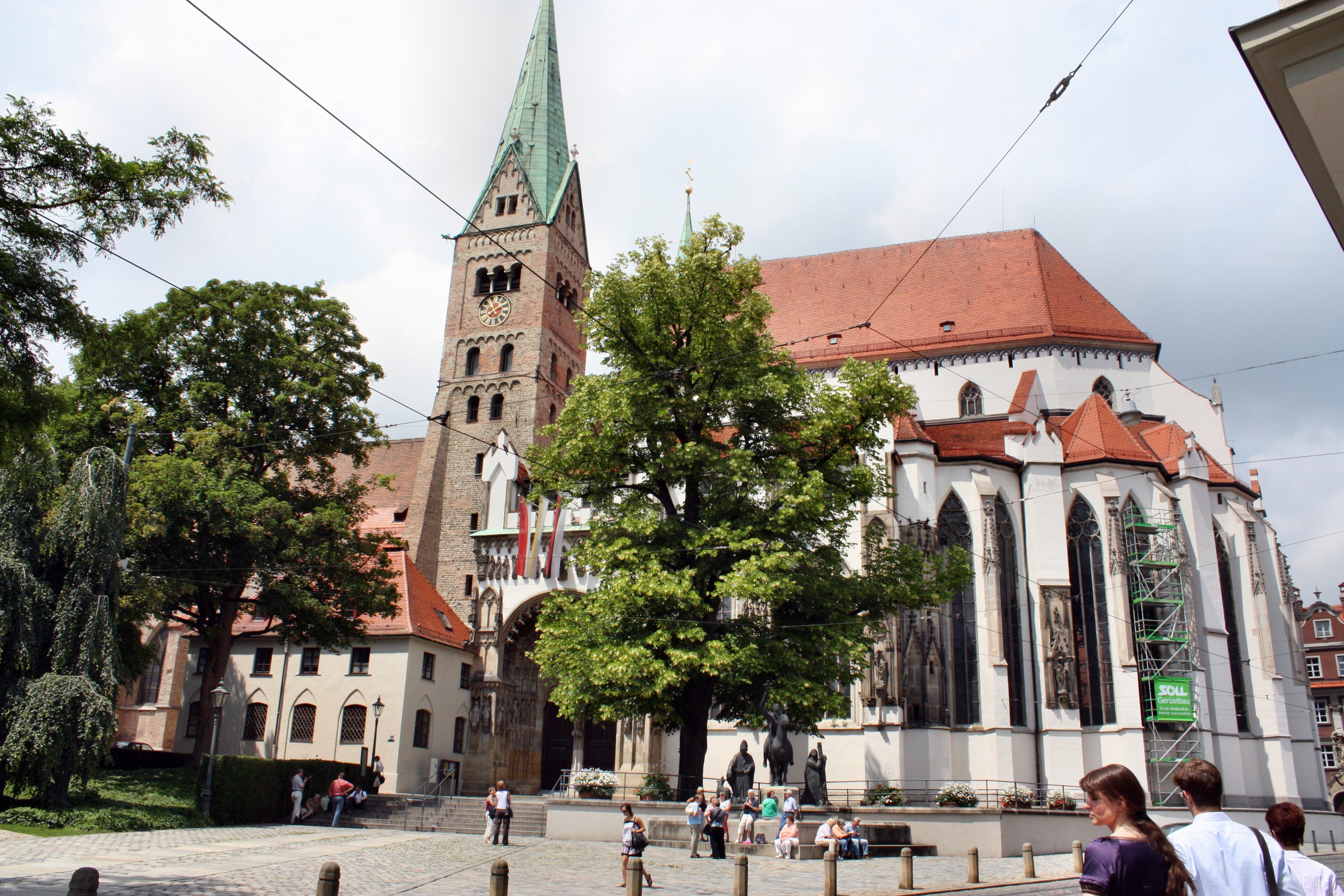 Dom Unserer Lieben Frau, Augsburg, Ansicht von Aussen